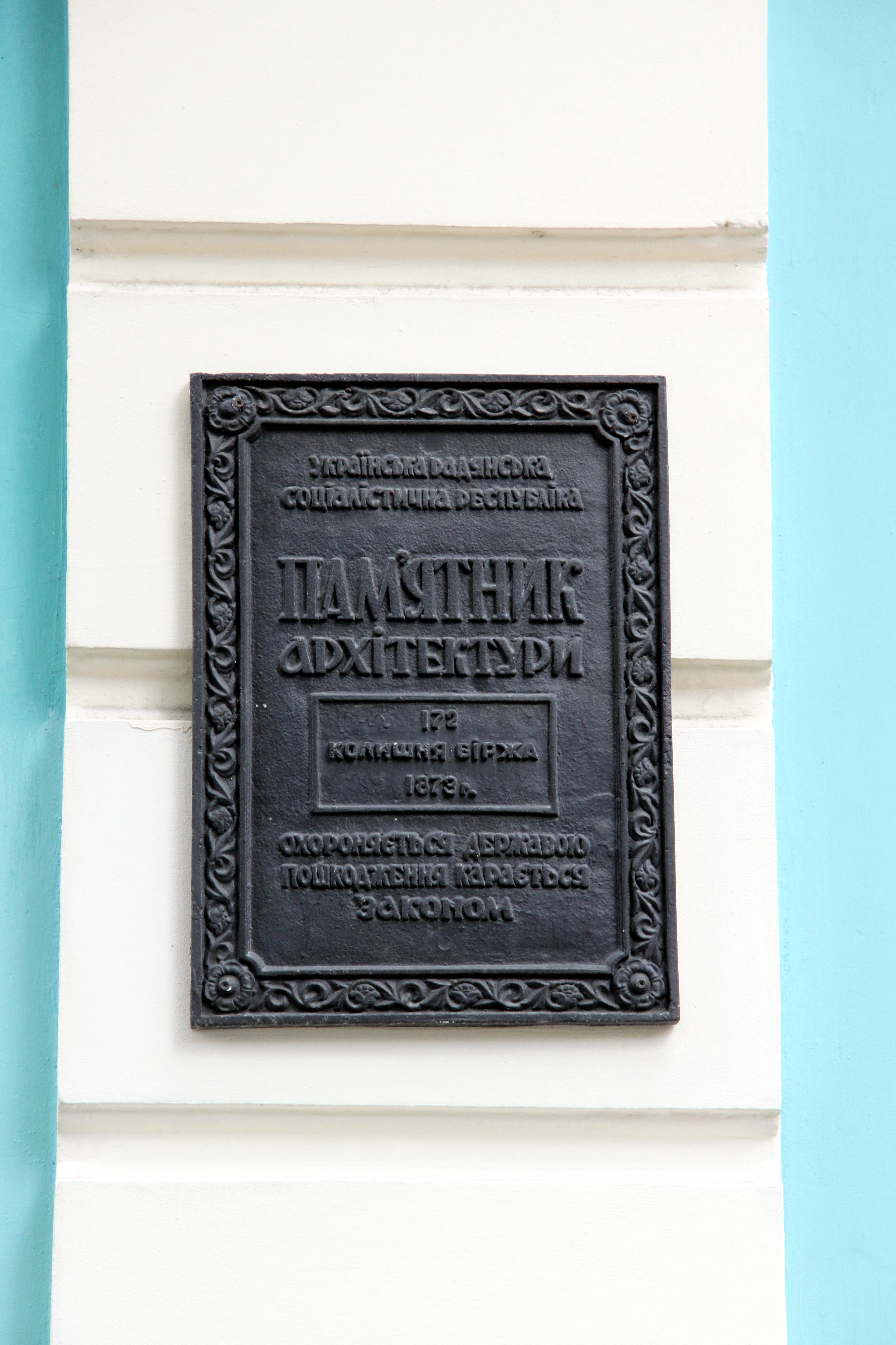 Будинок біржі, Київ, Інститутська вул., 7